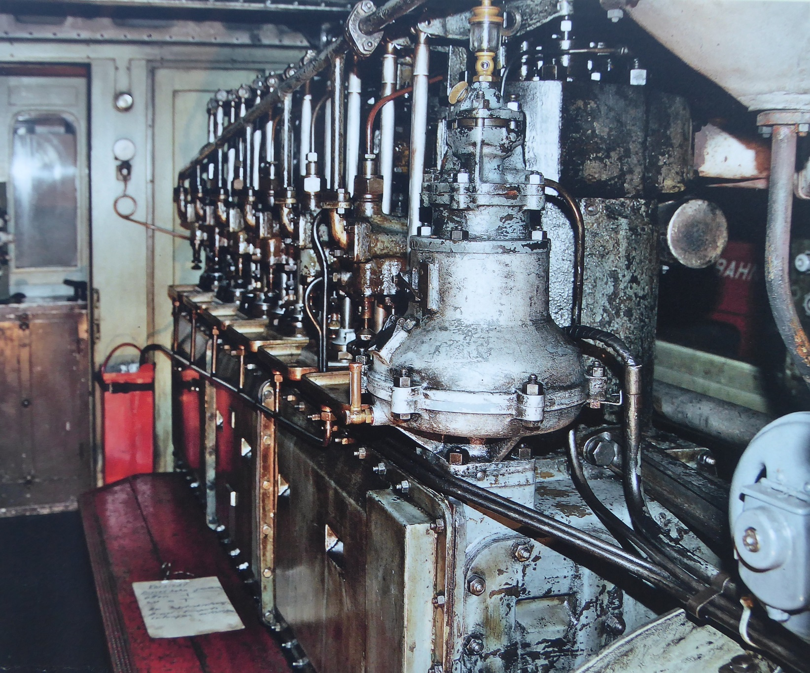 Dieselmotor des Triebwagens BCFm 2/4 der früheren Appenzeller Bahn (AB)